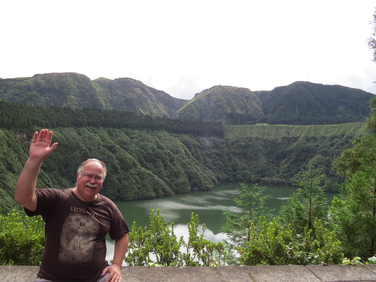 На Азорските острови.